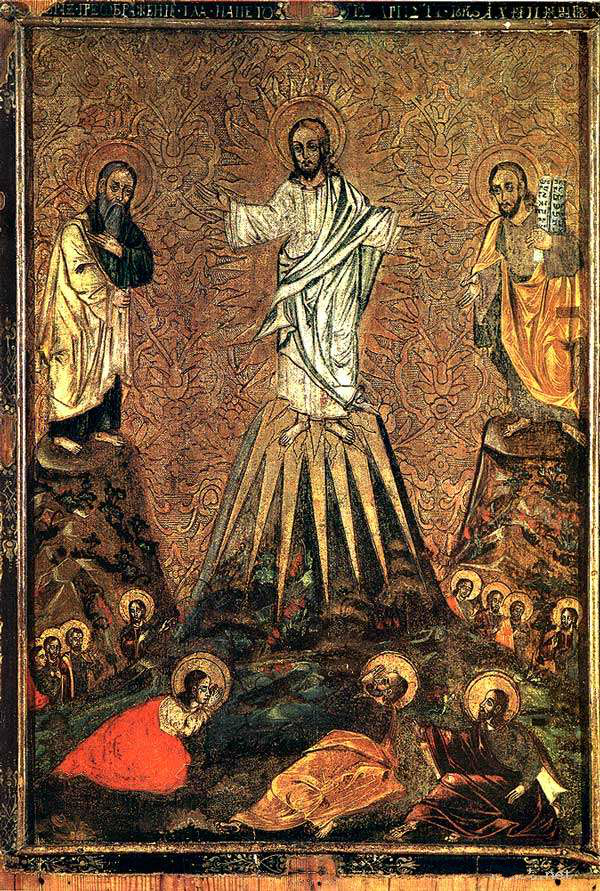 Маларыцкі майстар. Праабражэнне. 1648. Дошка, яечная тэмпера. 121х85,5х2,5-4,5.